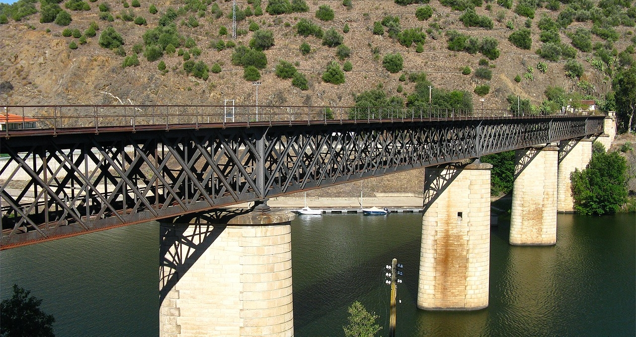 Menos segura que a ponte sobre o Côa - muita cautela ao atravessar pois há chapas sem parafusos